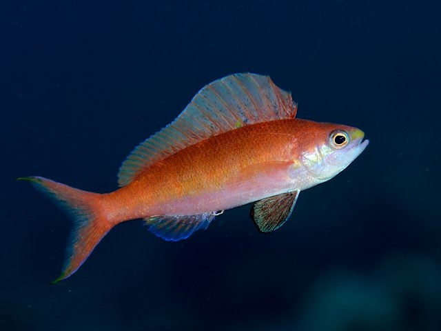 ホカケハナダイ♂ Rabaulichthys suzukii